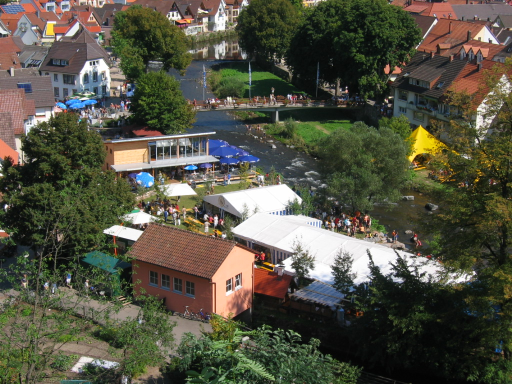 Die Flößerwiese in Wolfach (Schwarzwald) während des Flößerfestes. Im Hintergrund ist der "Gassensteg" zu sehen, eine der zwei Brücken, die in der Wolfacher Kernstadt über die Kinzig führen.